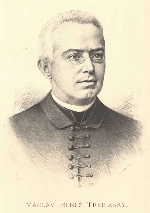 Portréty předních osobností od Jana Vilímka